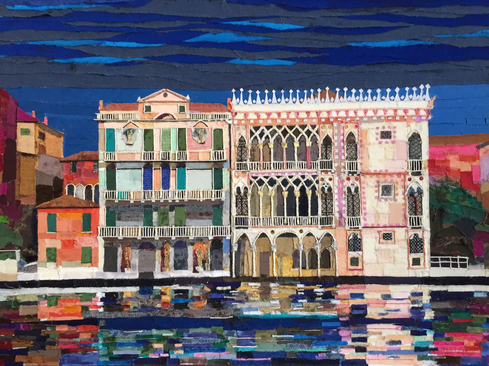 Palazzo Giusti e Ca' d'Oro (tarsie di seta)